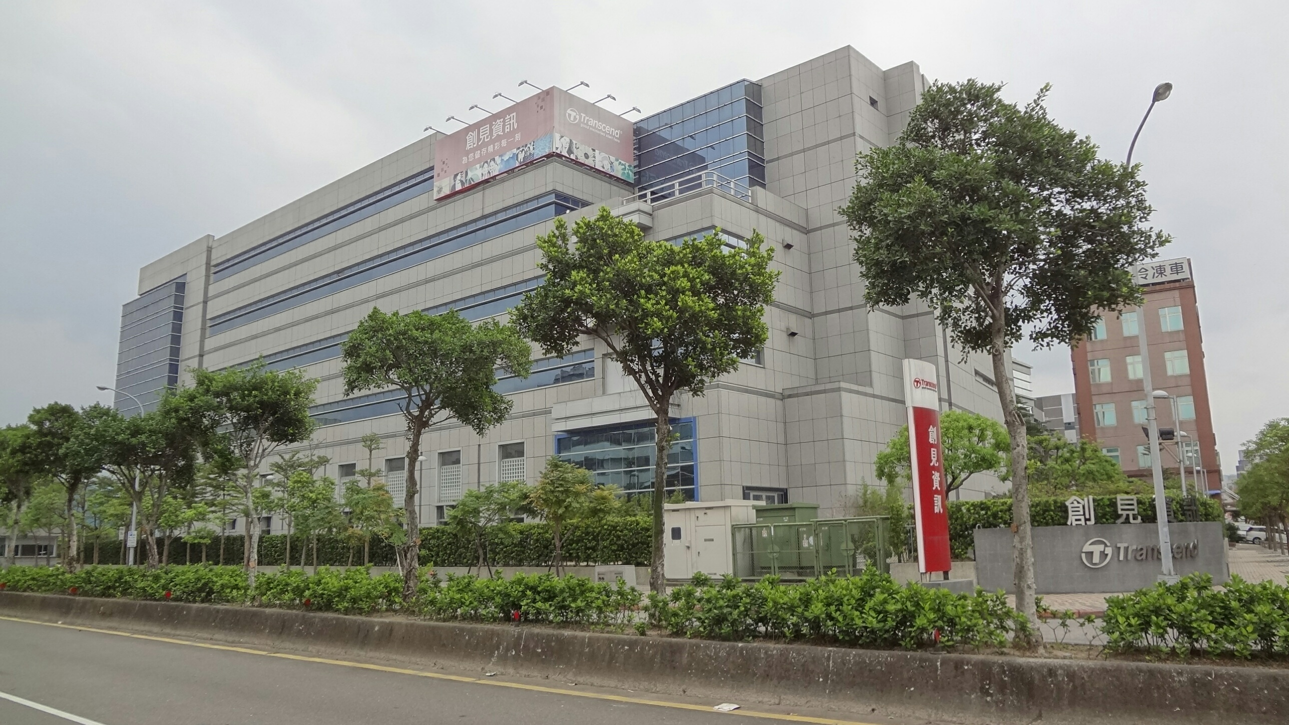 創見資訊總部，位於臺北市內湖區行忠路70號。